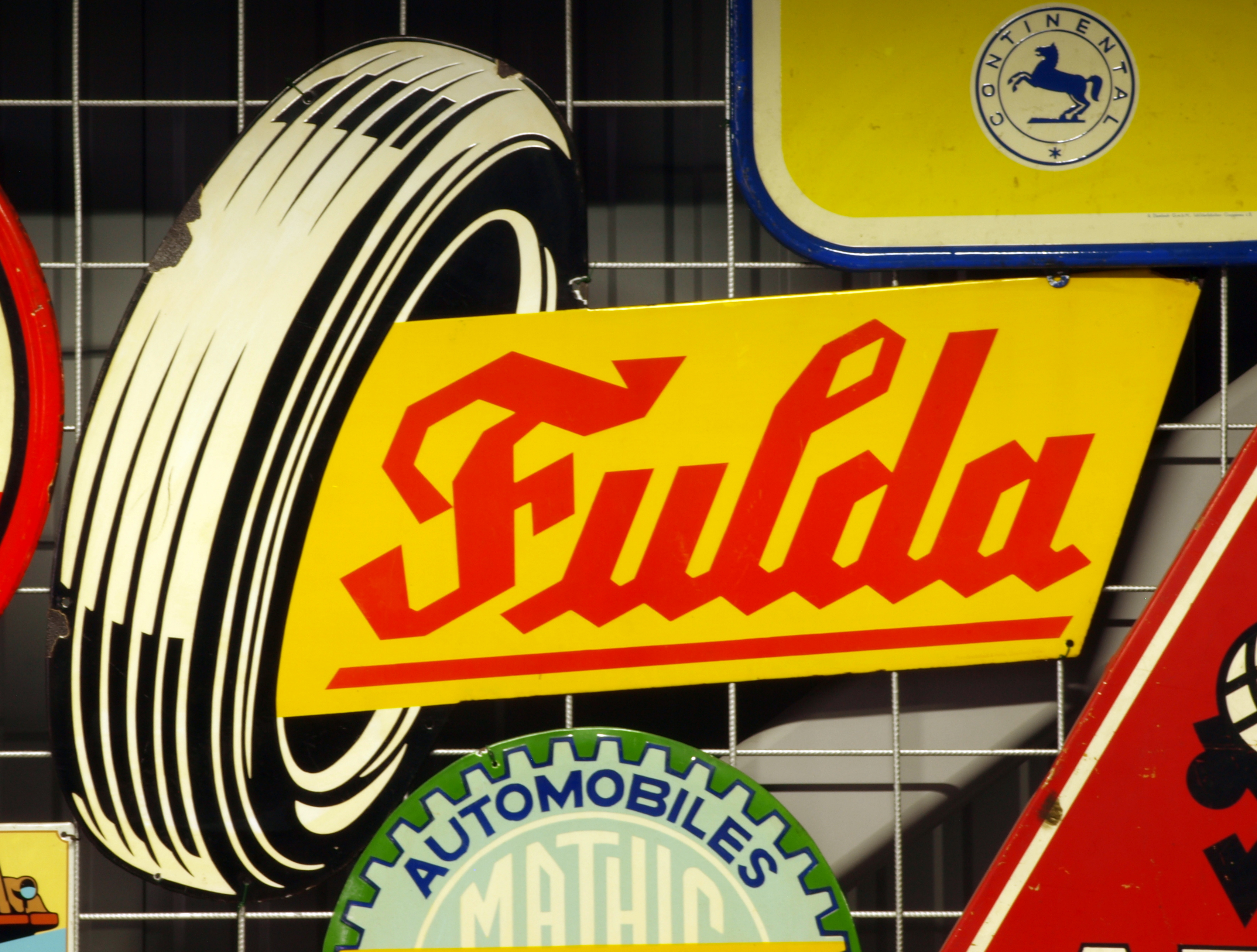 Enamel advertising sign, Fulda.